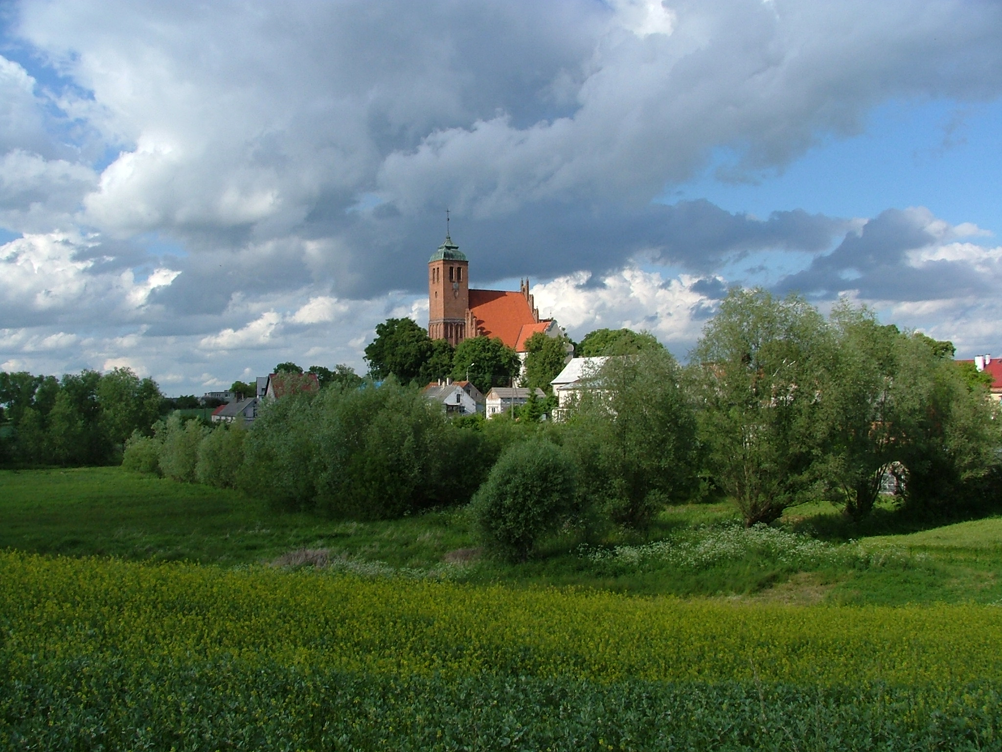 Piaseczno, kościół par. p.w. Narodzenia NMP, 1348, XV, 1676, XVIII